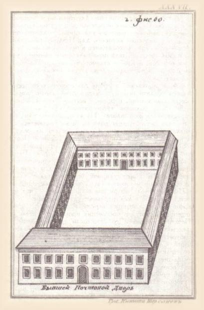 Почтовый двор (рисунок сер. 18 в.)